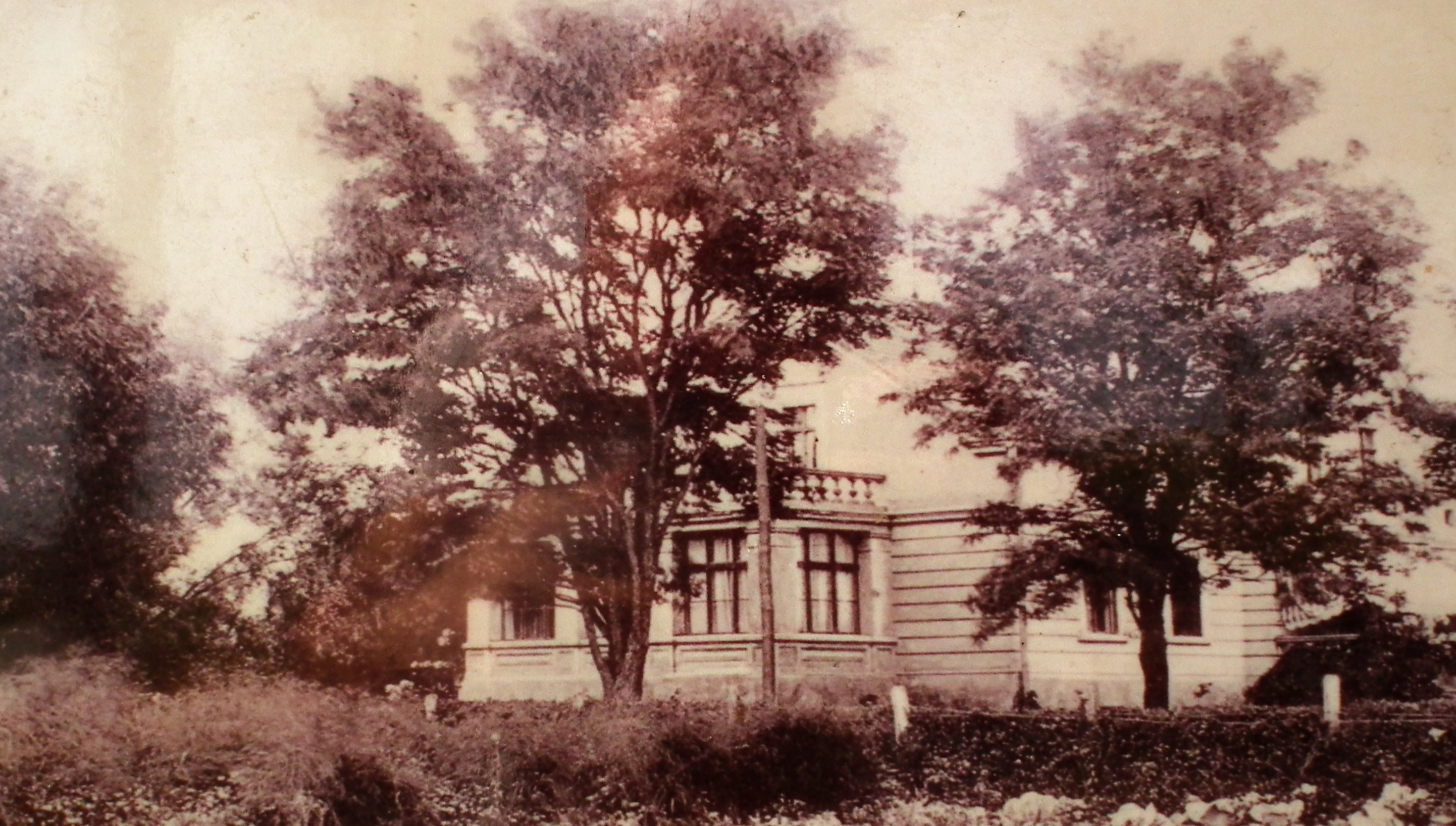 Łubowiczki koło Kiszkowa. Stare zdjęcie dworu na tablicy informacyjnej.